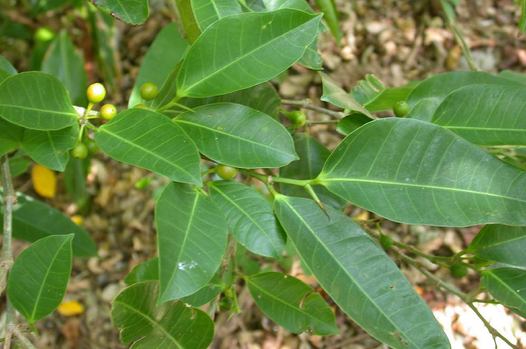 Ficus virgata：ハマイヌビワ 2002/08/19 沖縄本島南部：Okinawa Island